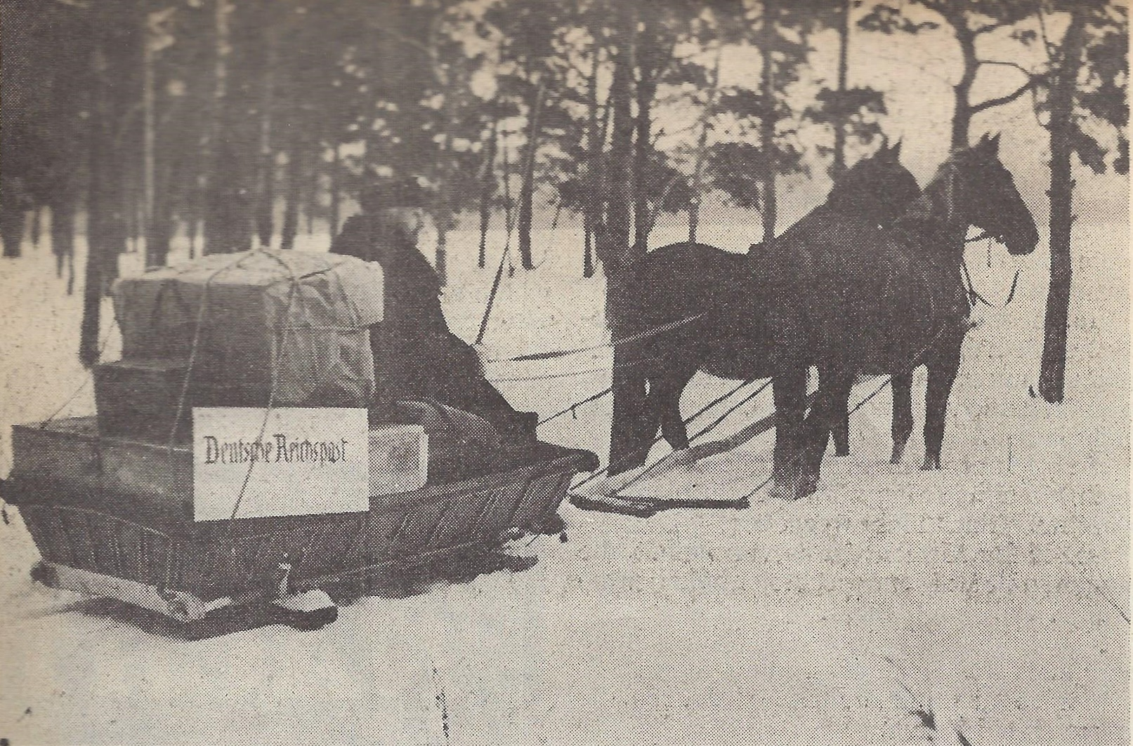 Pferdeschlitten der Deutschen Reichspost auf der Kurischen Nehrung.